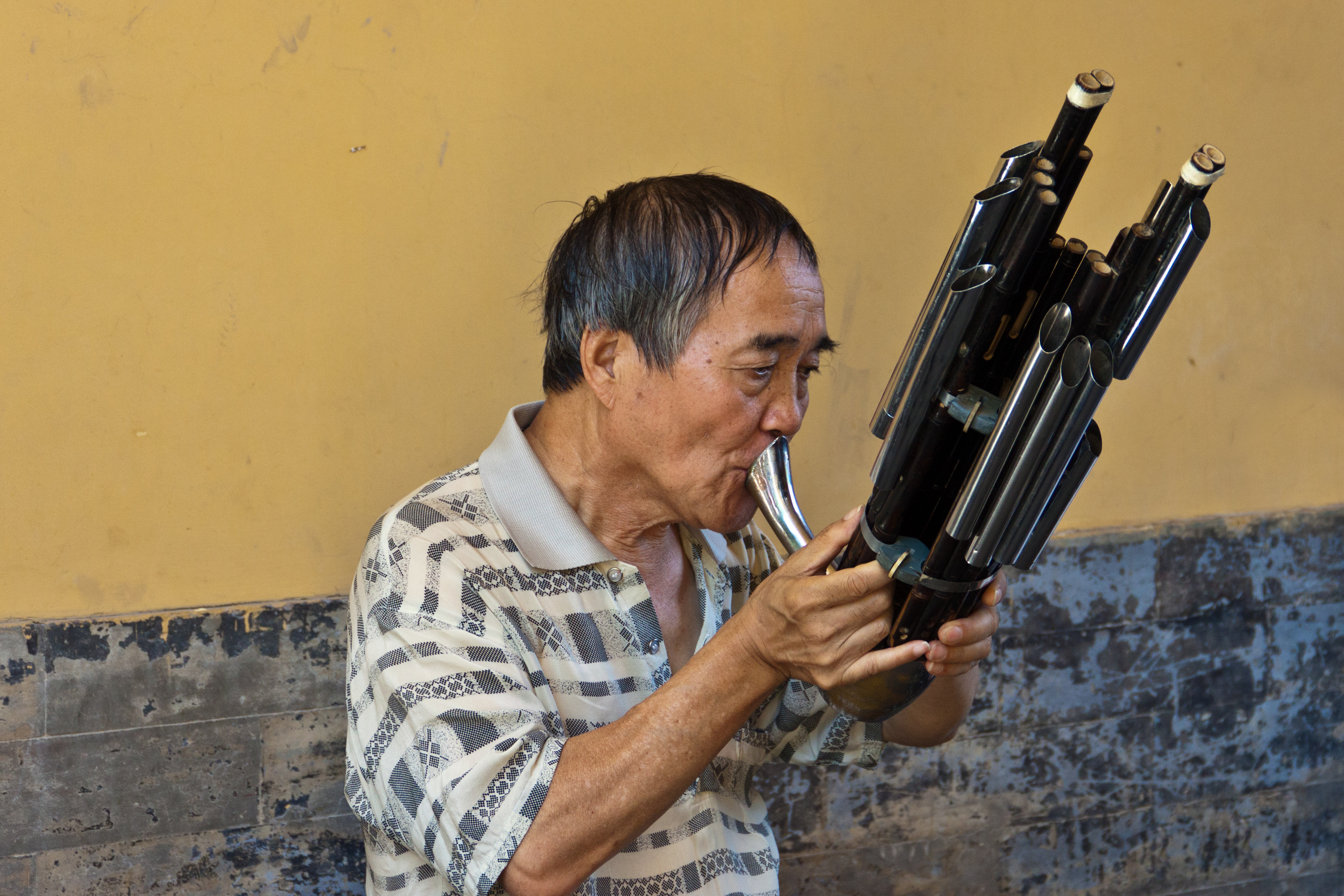 中文（台灣）: 正在吹奏笙的人